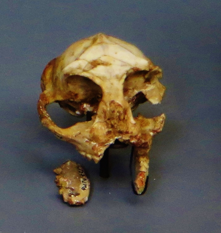 Fossil of Necrolemur, an extinct mammal - Took the picture at Musee d'Histoire Naturelle, Paris